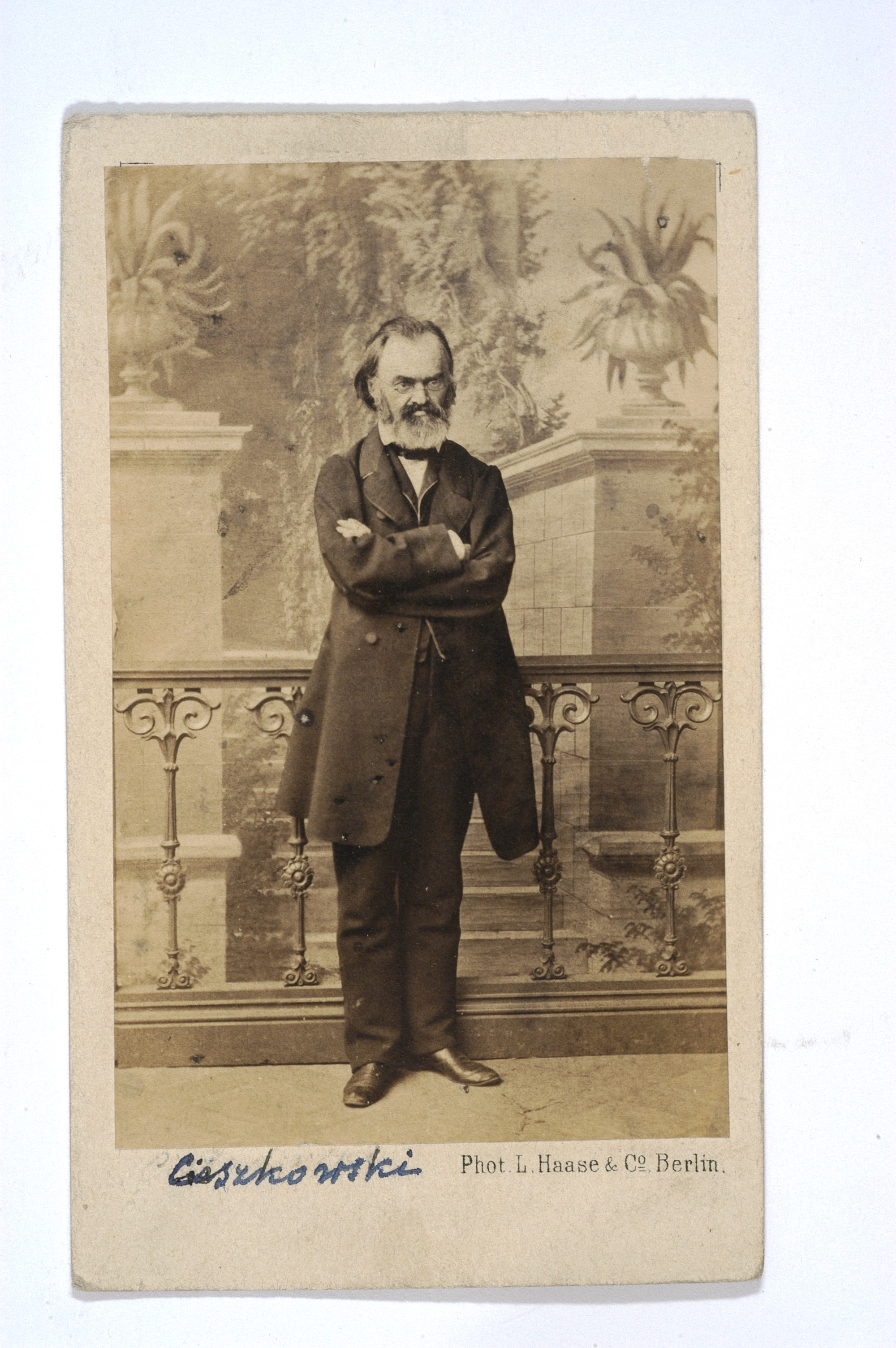 August Cieszkowski, ok. 1865 r.